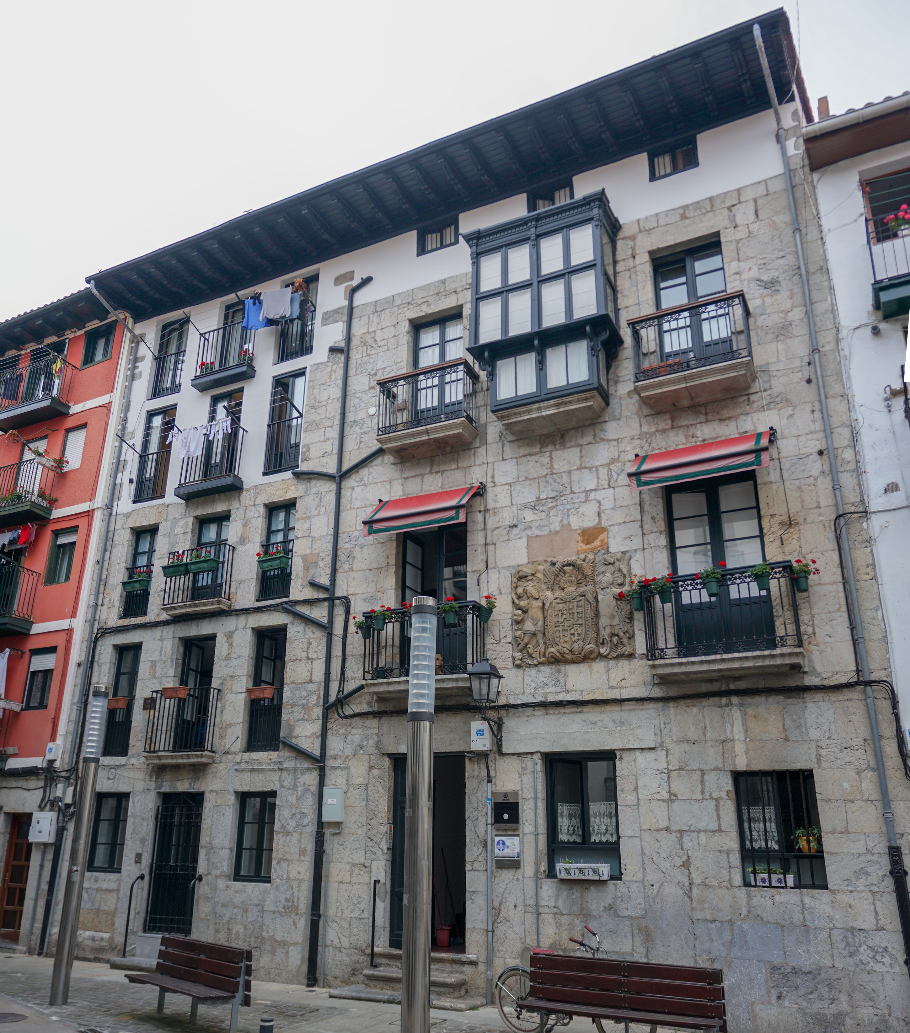 Torre Upaetxea